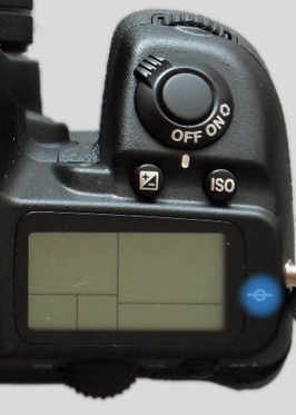 Indicateur de plan focal.